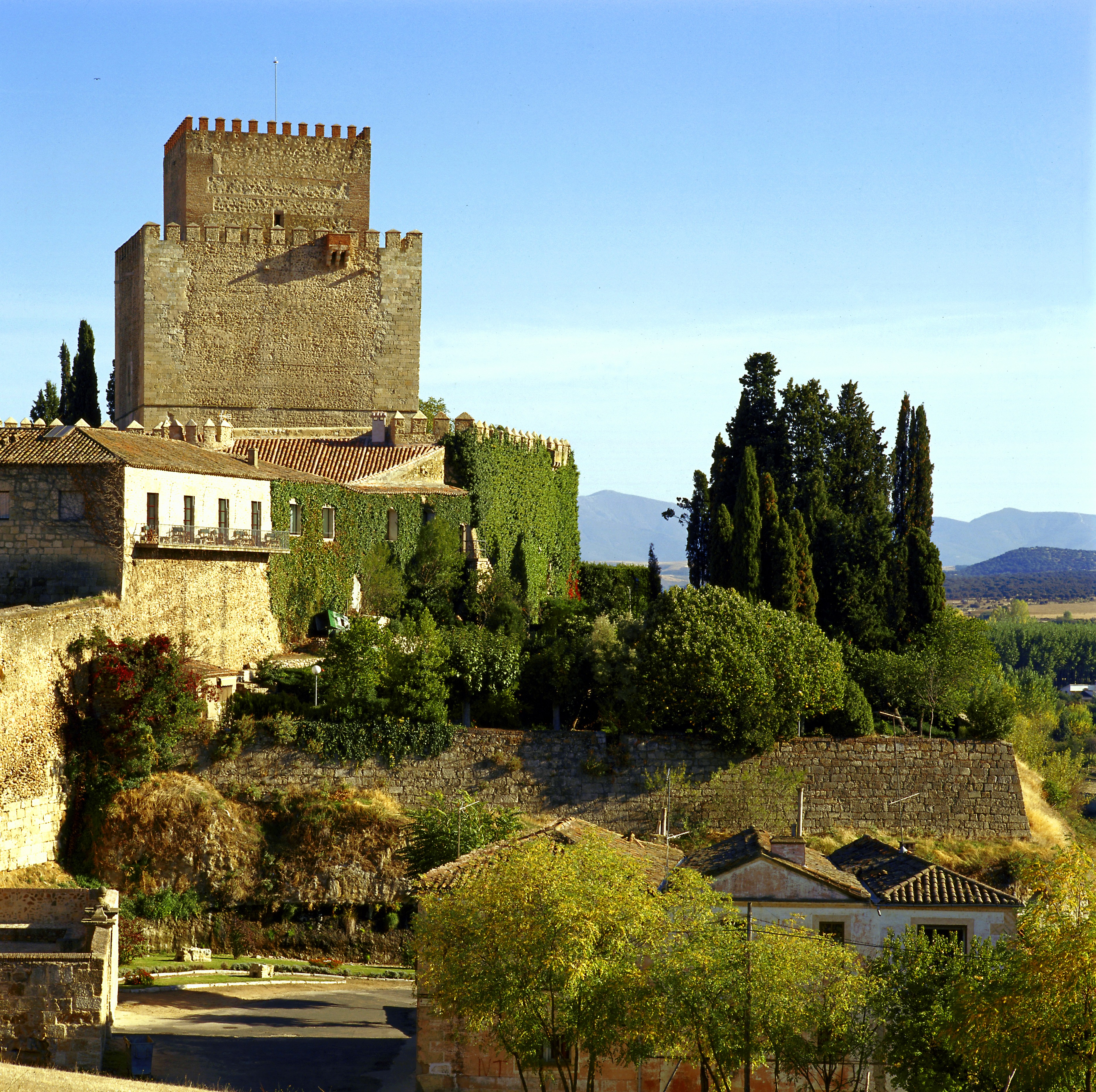 Parador de Ciudad Rodrigo vistas